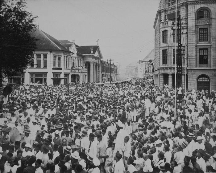 Foto. Kerumunan orang di suatu jalan di Medan tanggal 4 Februari 1921, pada saat prosesi pemakaman Kapiten (Cina) Tjong A Fie